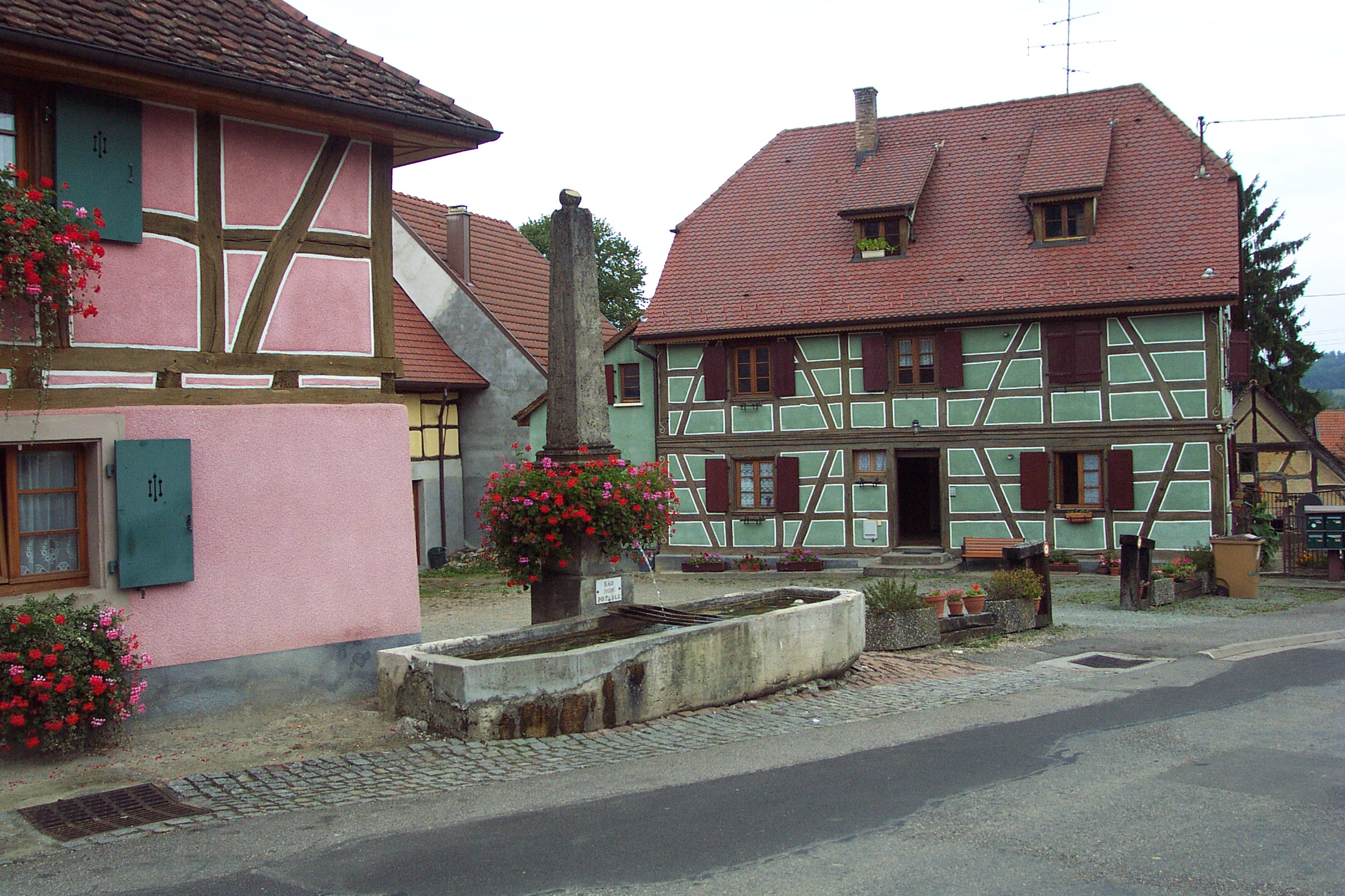 Vieille fontaine